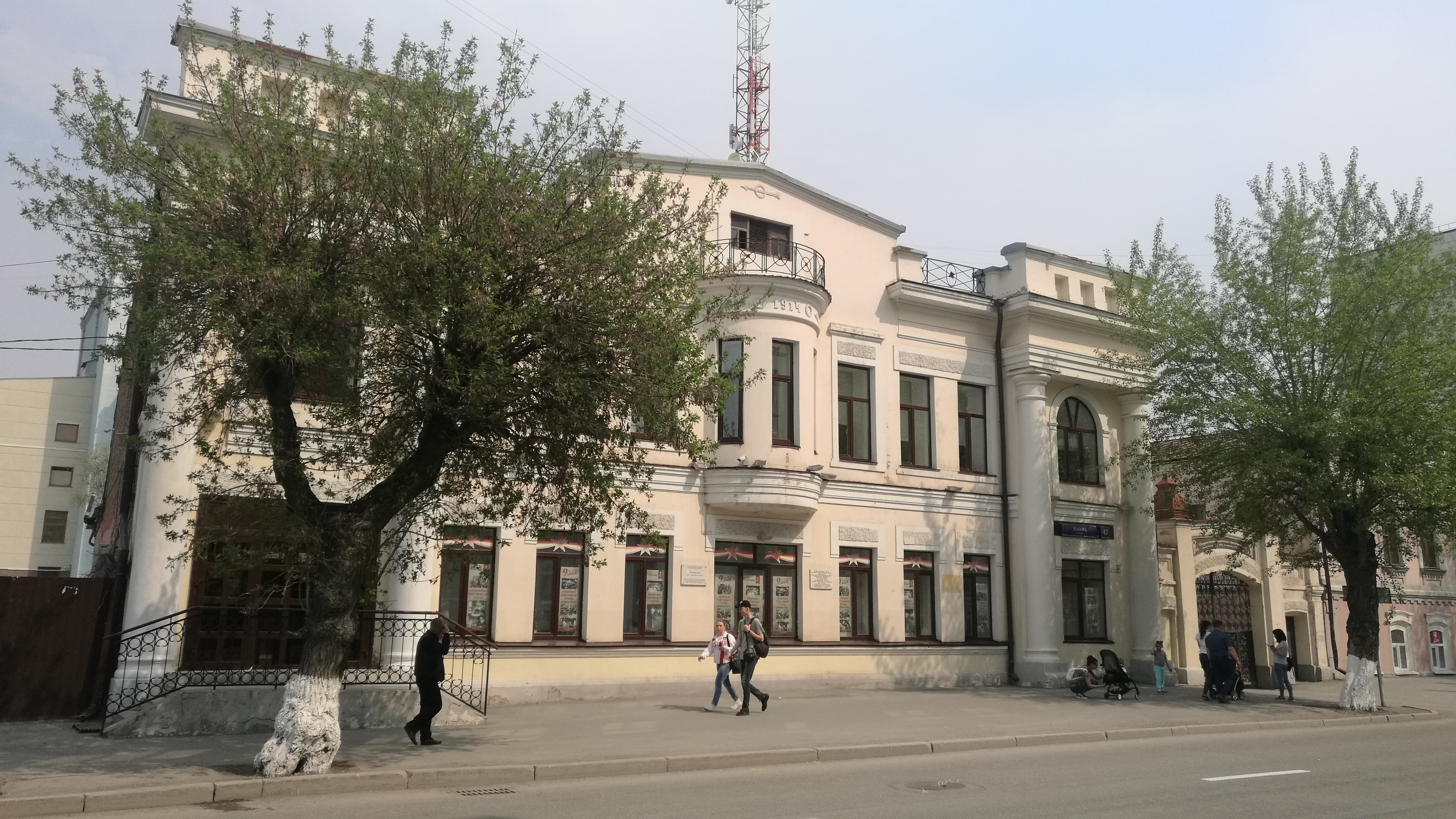 Strato Lenin. Tjumeno, Rusio.